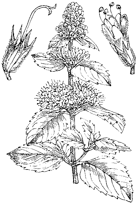 Slika 396. Povodna meta [sic]. (Méntha aquática.)